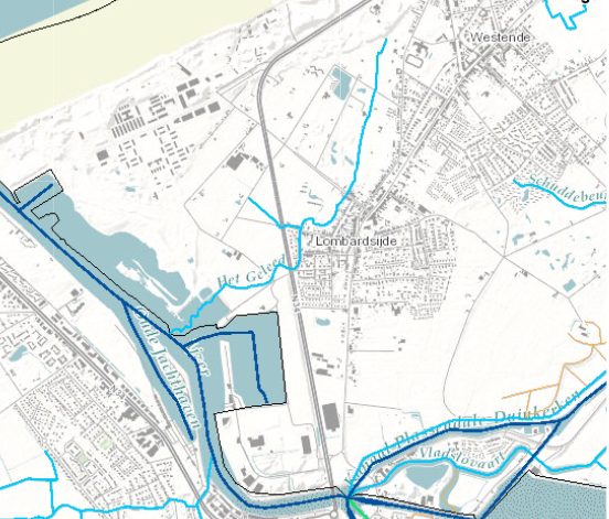 Kaart van de IJzermonding, de agglomeraties Nieuwpoort, Lombardsijde en Westende en een waterloop, Het Geleed